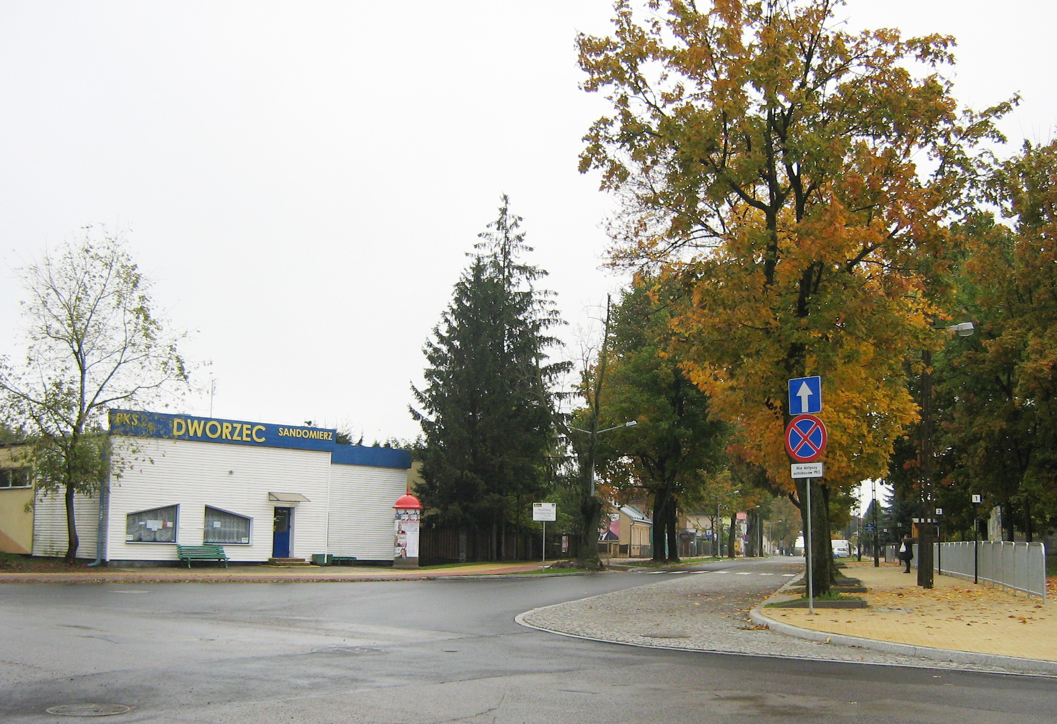 Ulica 11 Listopada w Sandomierzu. Widok ze skrzyżowania z ul. Wojska Polskiego na dworzec autobusowy – po lewej budynek kas, po prawej zatoki stanowisk autobusowych.